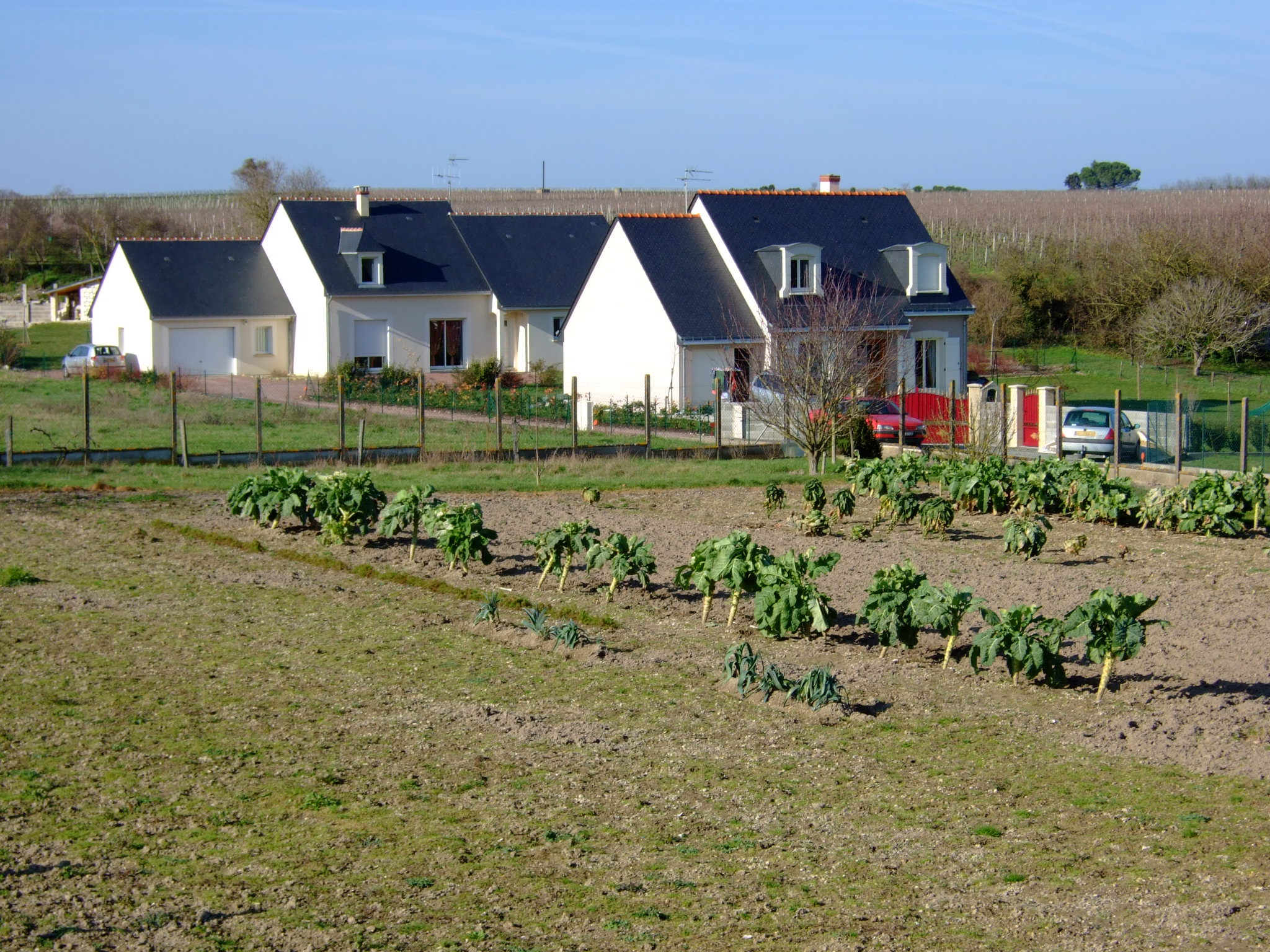 Constructions récentes à Souzay (commune de Souzay-Champigny)